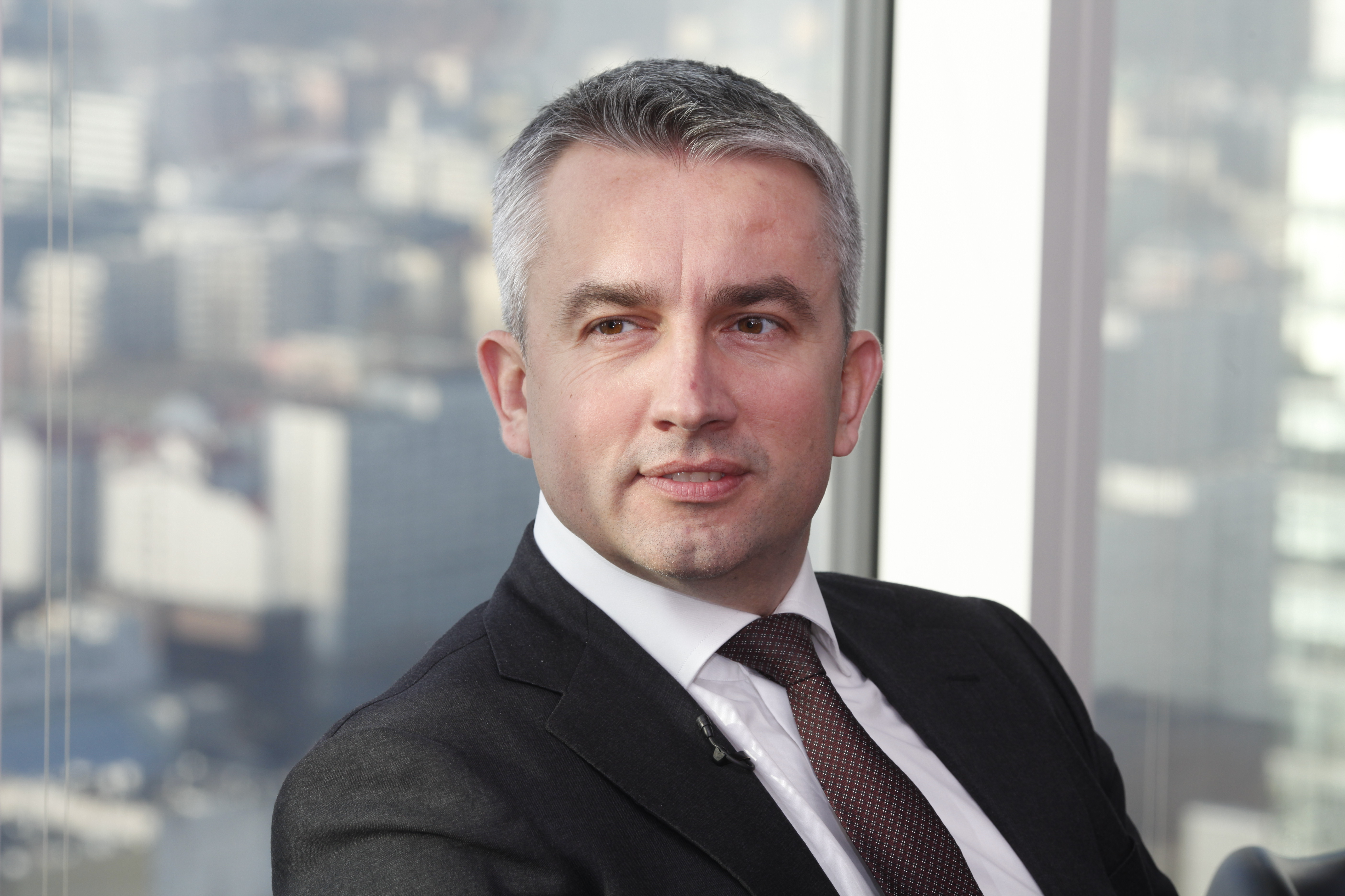 Jacek Levernes, polski biznesmen i menadżer, prezes Związku Liderów Sektora Usług Biznesowych w Polsce